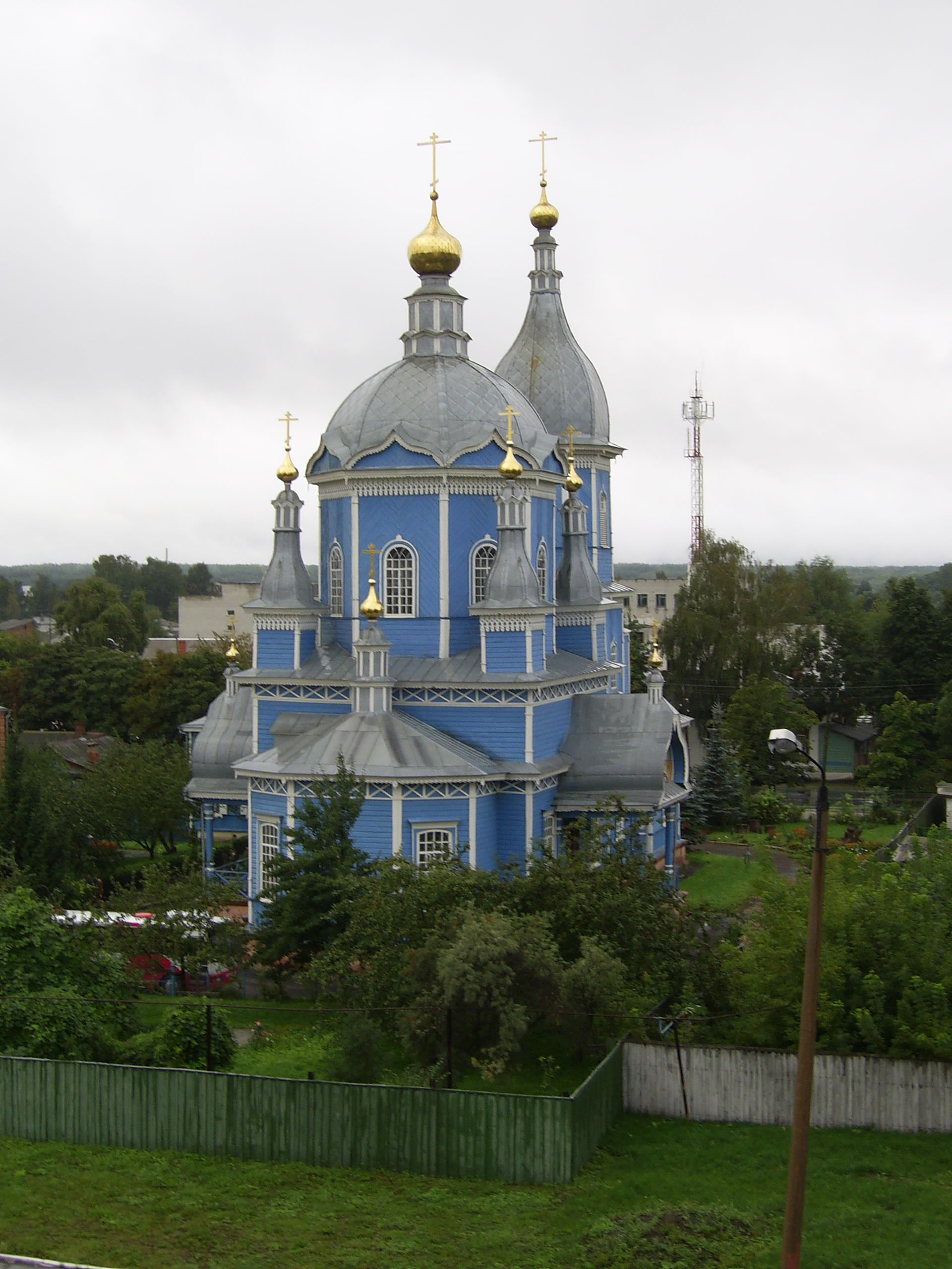 Спасо-преображенская церковь (Брянская область, Новозыбков, первомайская улица, 7)